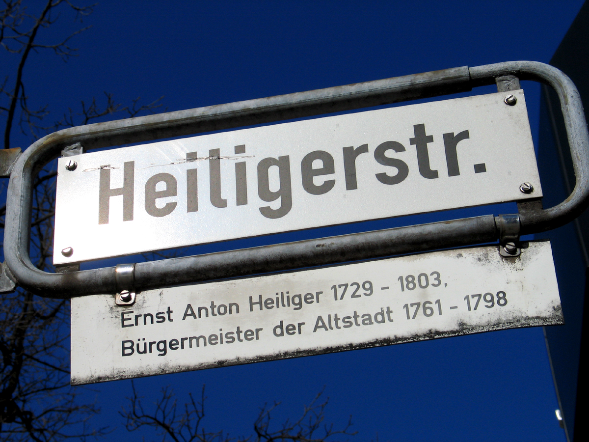 Die Legende unter dem Straßenschild der Heiligerstraße Ecke Schmiedestraße erläutert: „Ernst Anton Heiliger 1729 - 1803, Bürgermeister der Altstadt 1761 - 1791“ ...